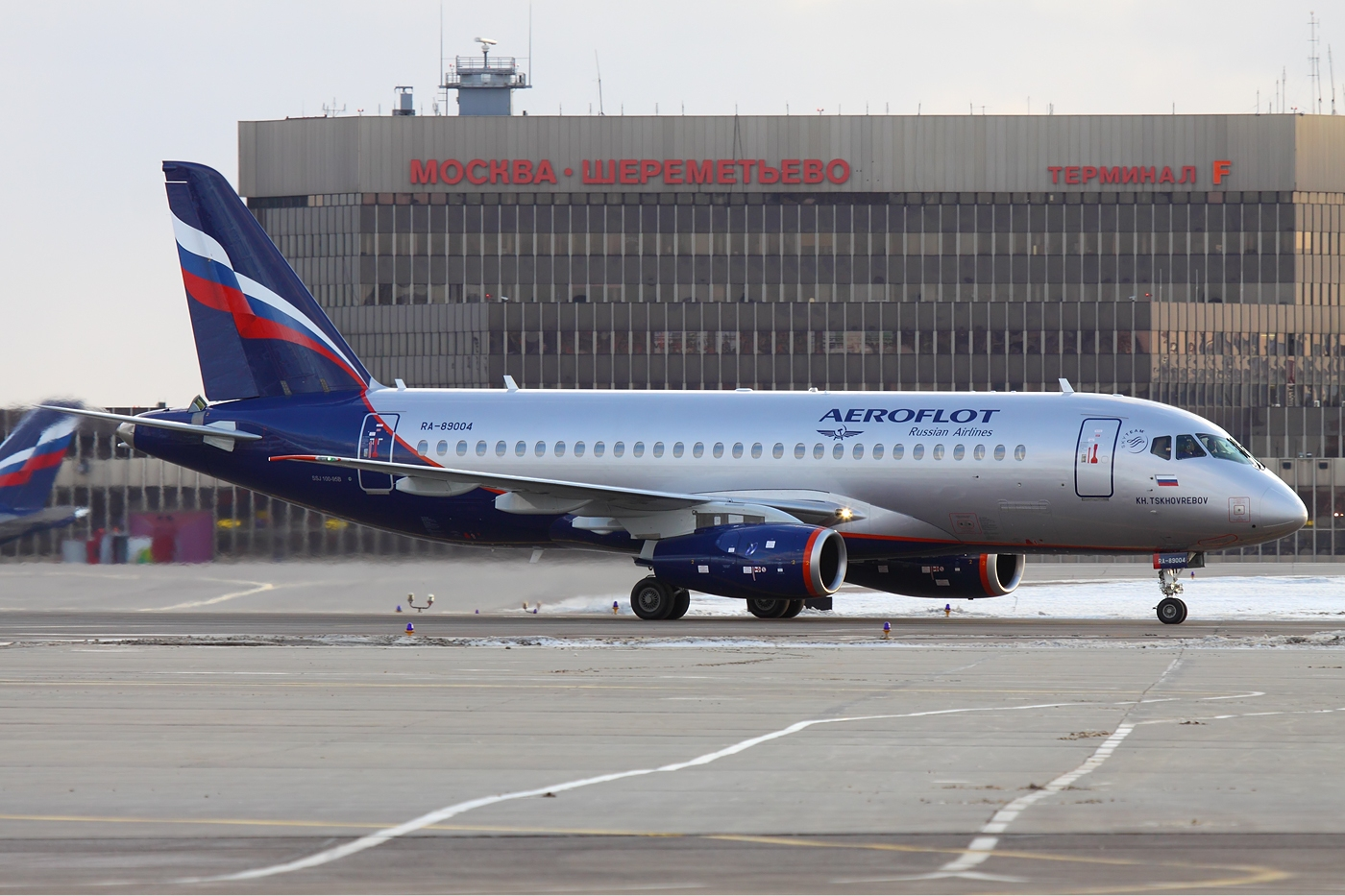 Aeroflot Sukhoi Superjet RA-89004